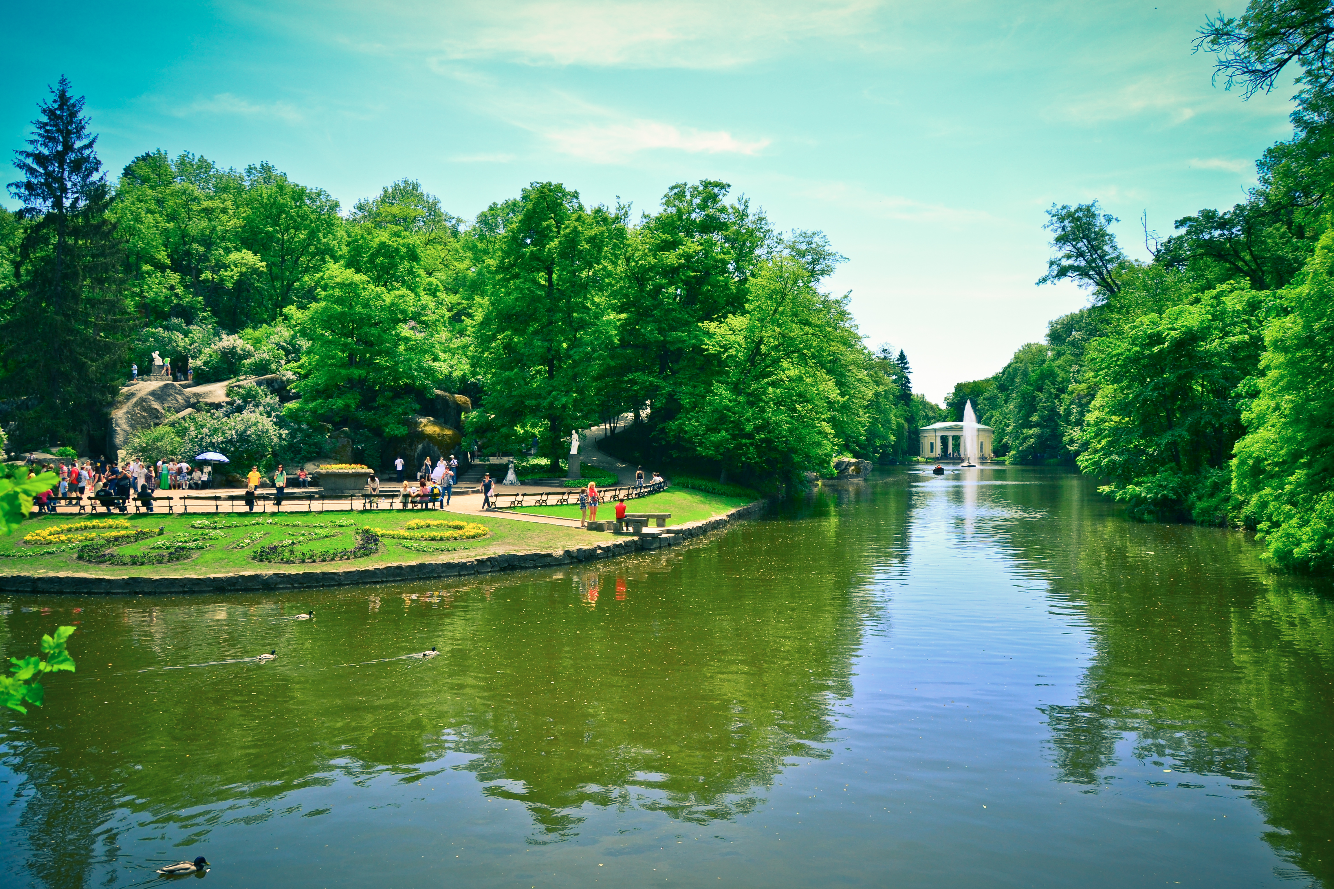 Парк „Софіївка" з комплексом водойм, паркових будівель, споруд і скульптур, Умань, Садова вул., 55